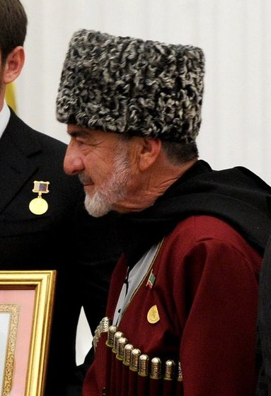 Вручение грамот о присвоении звания «Город воинской славы». Грамота о присвоении почётного звания «Город воинской славы» вручена представителям Грозного.